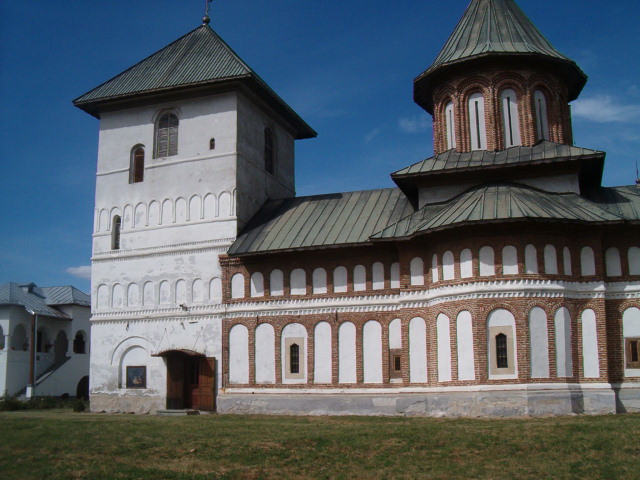 Biserica manastirii din alt unghi 01